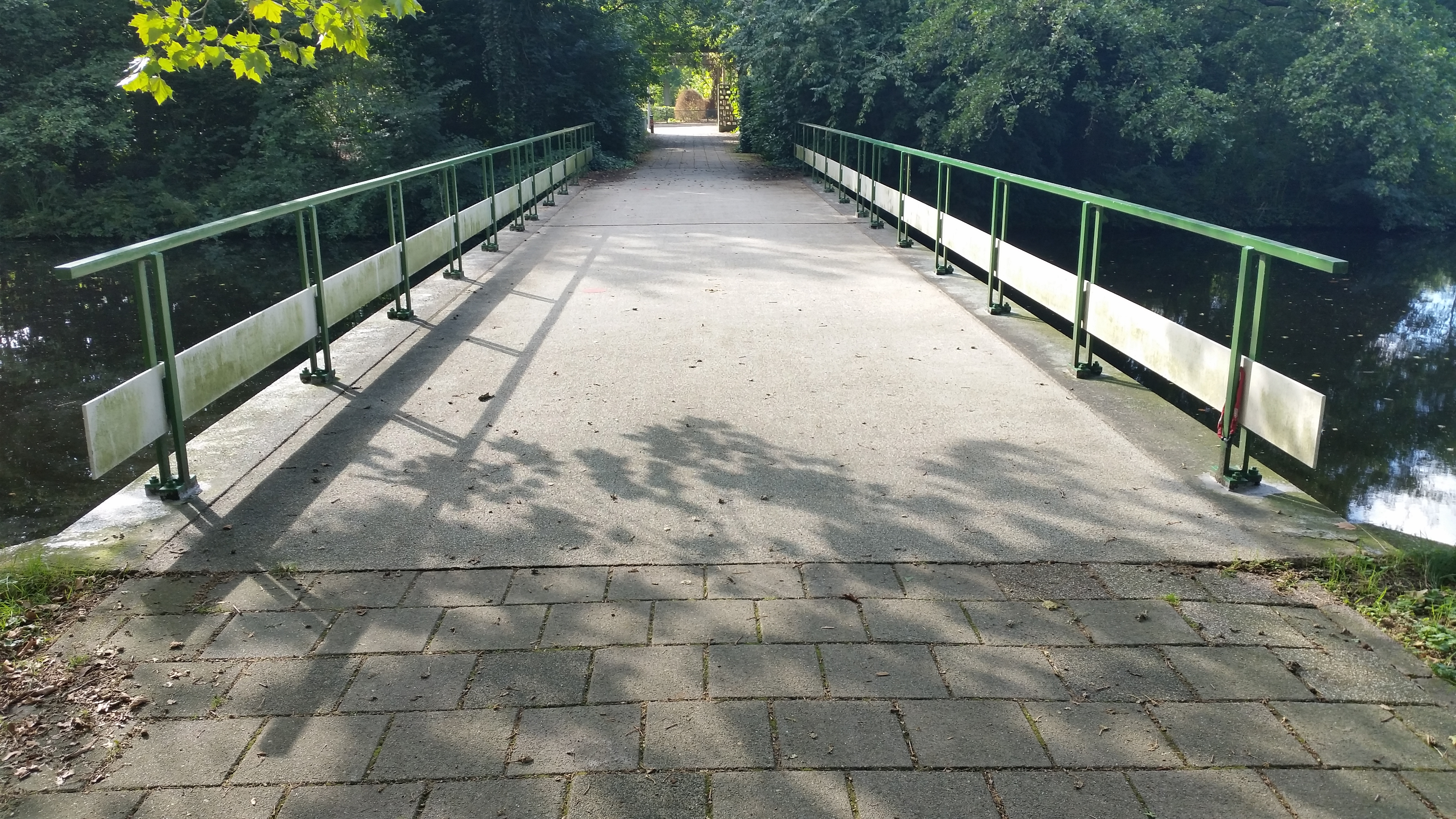 Brug 822 (in Amsterdam); gezien naar het westen